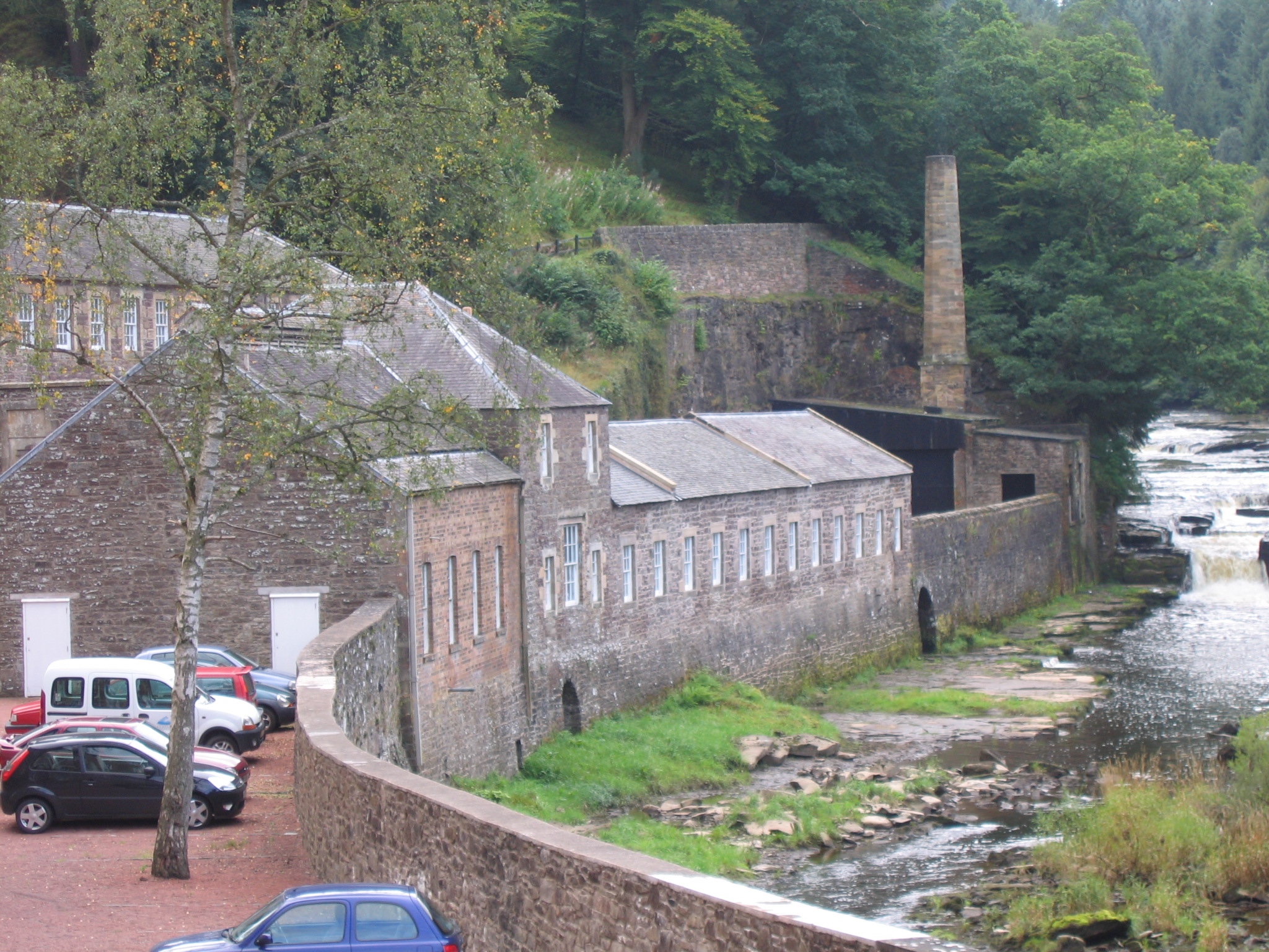 New Lanark View